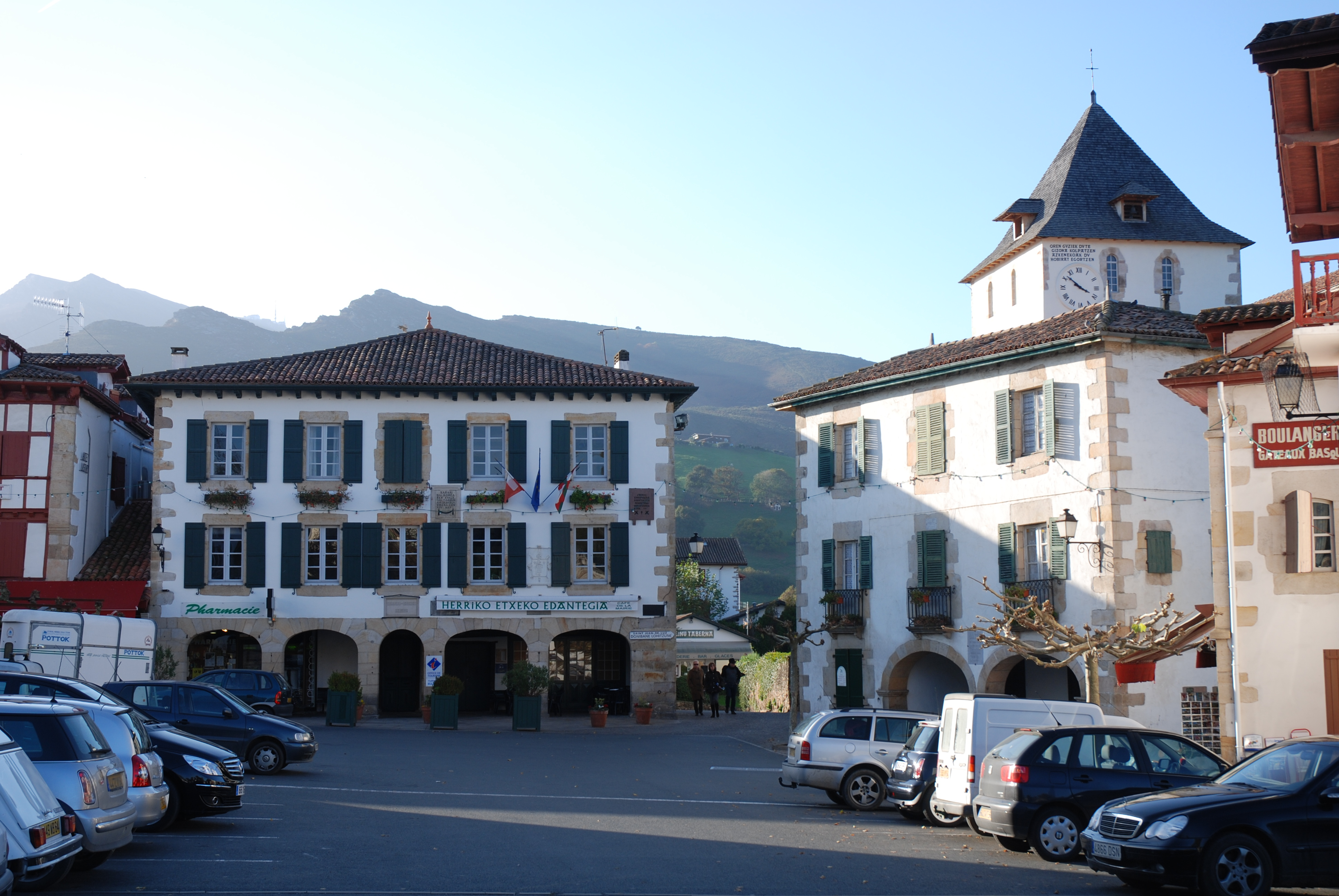 Sare, la mairie et le clocher de l'église Saint-Martin